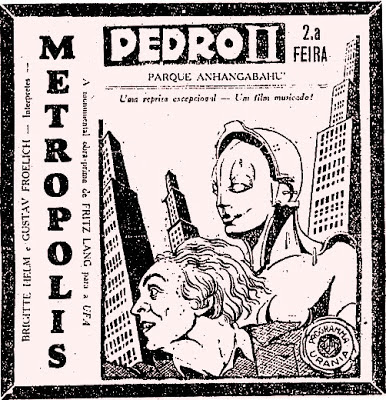 Anúncio de reprise de 'Metrópolis' de Fritz Lang no Cine Pedro II, no Parque do Anhangabaú.